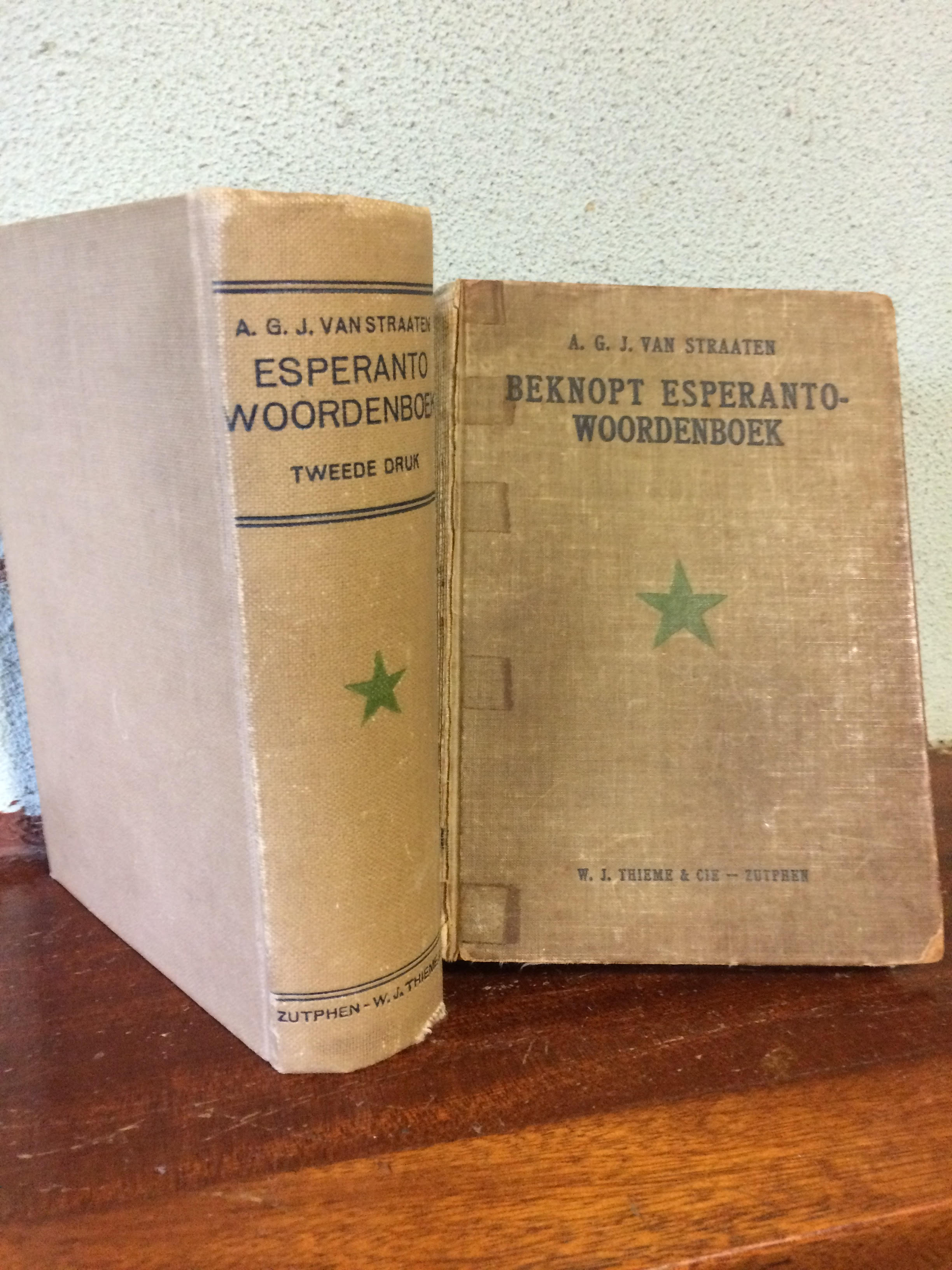 Kovrilo de la vortaro de van Straaten